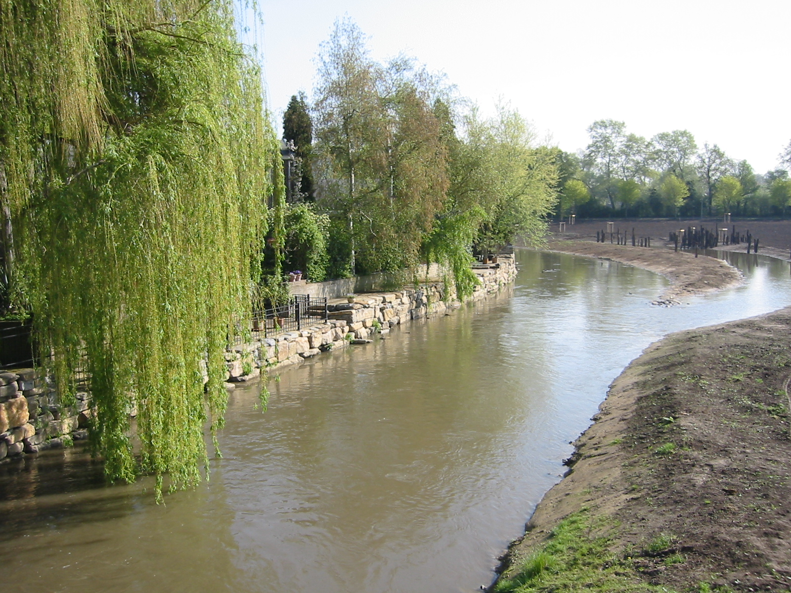 Eigen foto. GerardM 25 apr 2004 08:31 (CEST) De Jeker mag aan een kant vrij gaan stromen en doen (in een park), aan de andere kant zijn de huizen met een stenen schoeing beschermd.